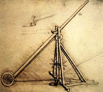 рисунок Леонардо да Винчи - Машина для поднятия длинных предметов